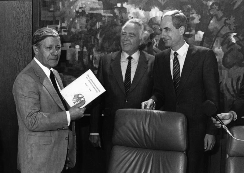 Vor der letzten Kabinettsitzung der Minderheitsregierung unter Bundeskanzler Helmut Schmidt überreichen der Präsident des Bundesarchivs, Prof. Dr. Hans Booms (M.), und Bundesjustiz- und -innenminister Dr. Jürgen Schmude (r.) dem Regierungschef den ersten Band der Kabinettsprotokolle der Bundesregierung von 1949, erschienen im Bolt-Verlag. Die in Leinen gebundenen Protokolle enthalten wörtliche Passagen. "Nur gut", meinte der Kanzler dazu, "daß es heute keine Wortprotokolle mehr gibt."